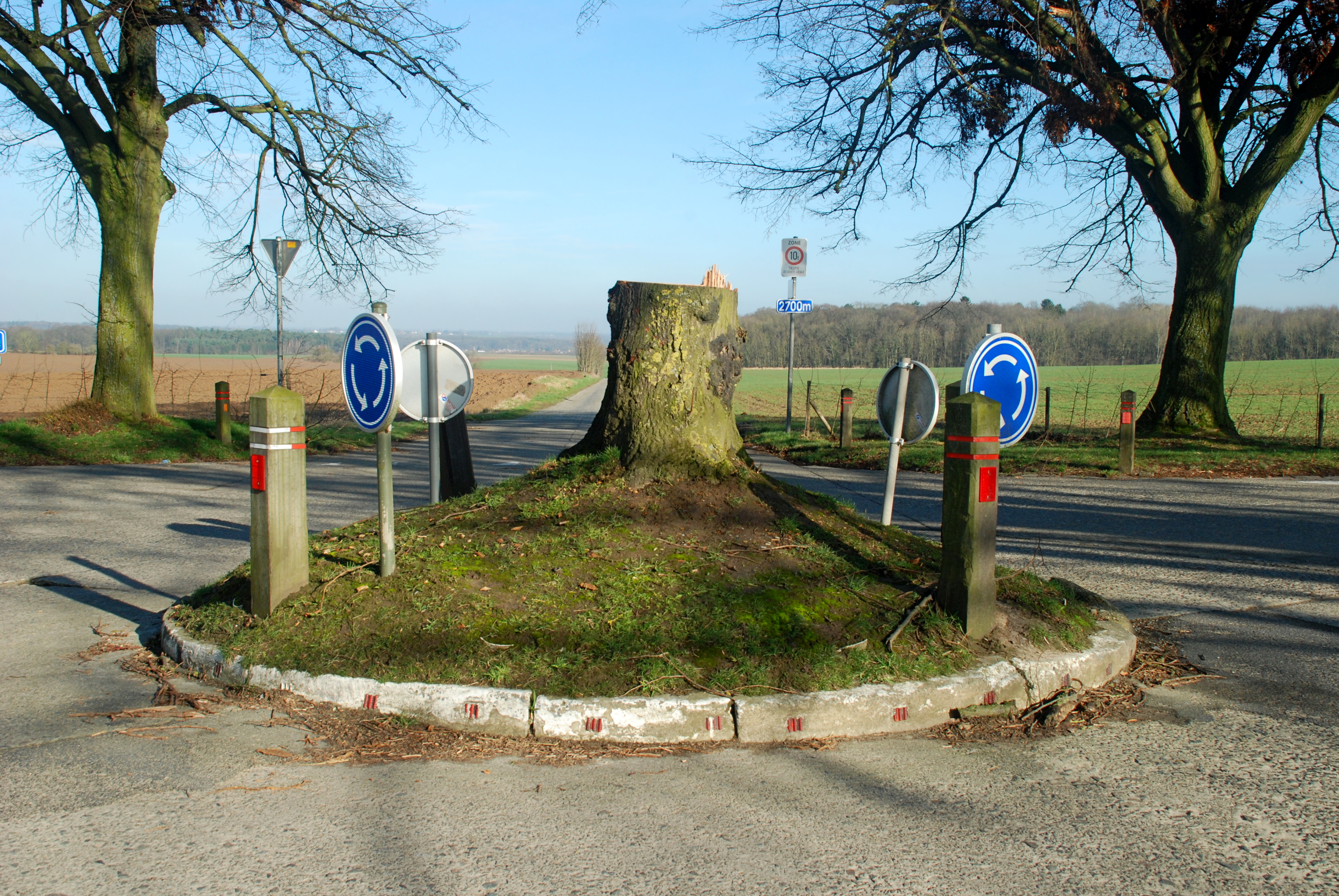 Belgique - Brabant wallon - Court-Saint-Étienne - Arbre de la justice (après acte de vandalisme en février 2017)